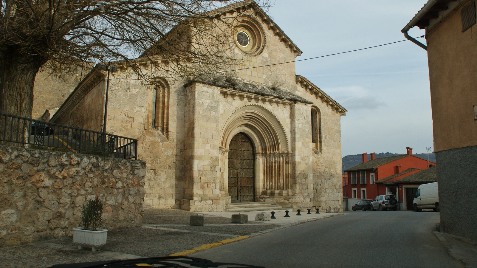 Brihuega, iglesia de San Miguel, villa de Guadalajara